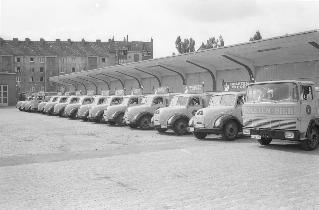 LKW für den Biertransport.